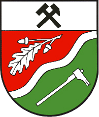 Wappen der Gemeinde Welkenbach